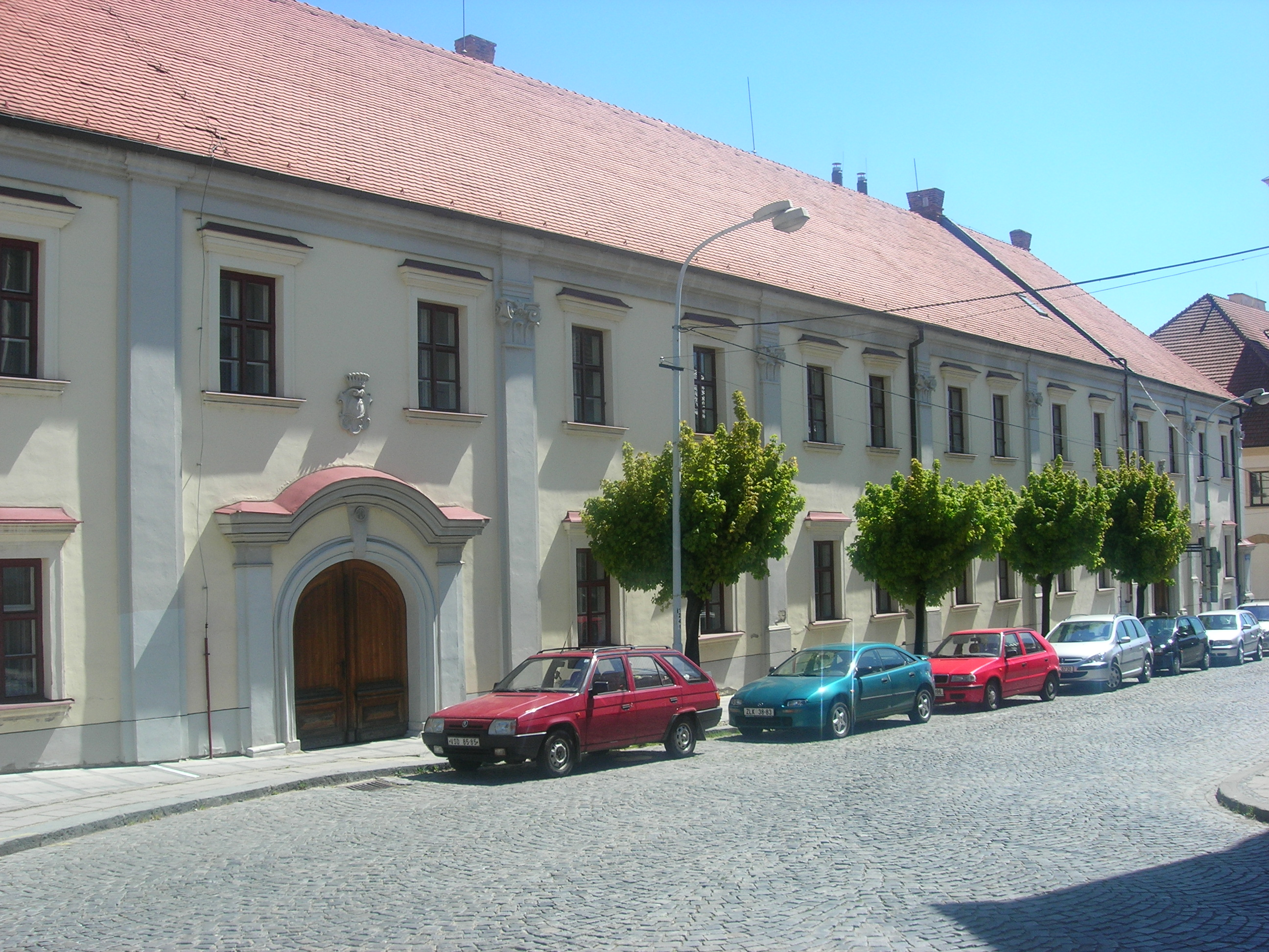 Pansky House in Uhersky Brod, Czech Republic